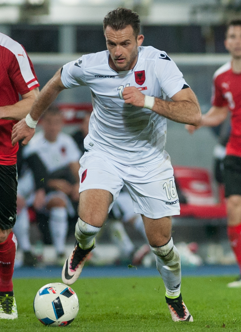 Wien, 26.03.2016, ÖFB Laenderspiel Oesterreich vs Albanien. Bild zeigt Sokol Cikalleshi (ALB).